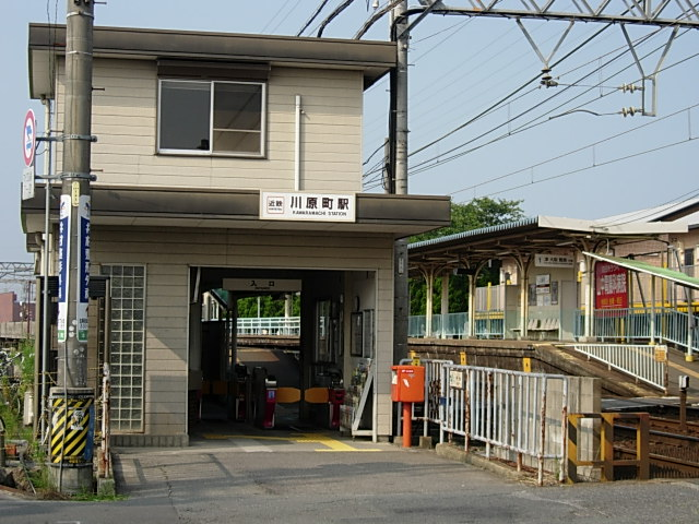 川原町駅